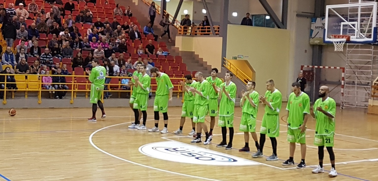 Elektrobud-Investment ZB Pruszków